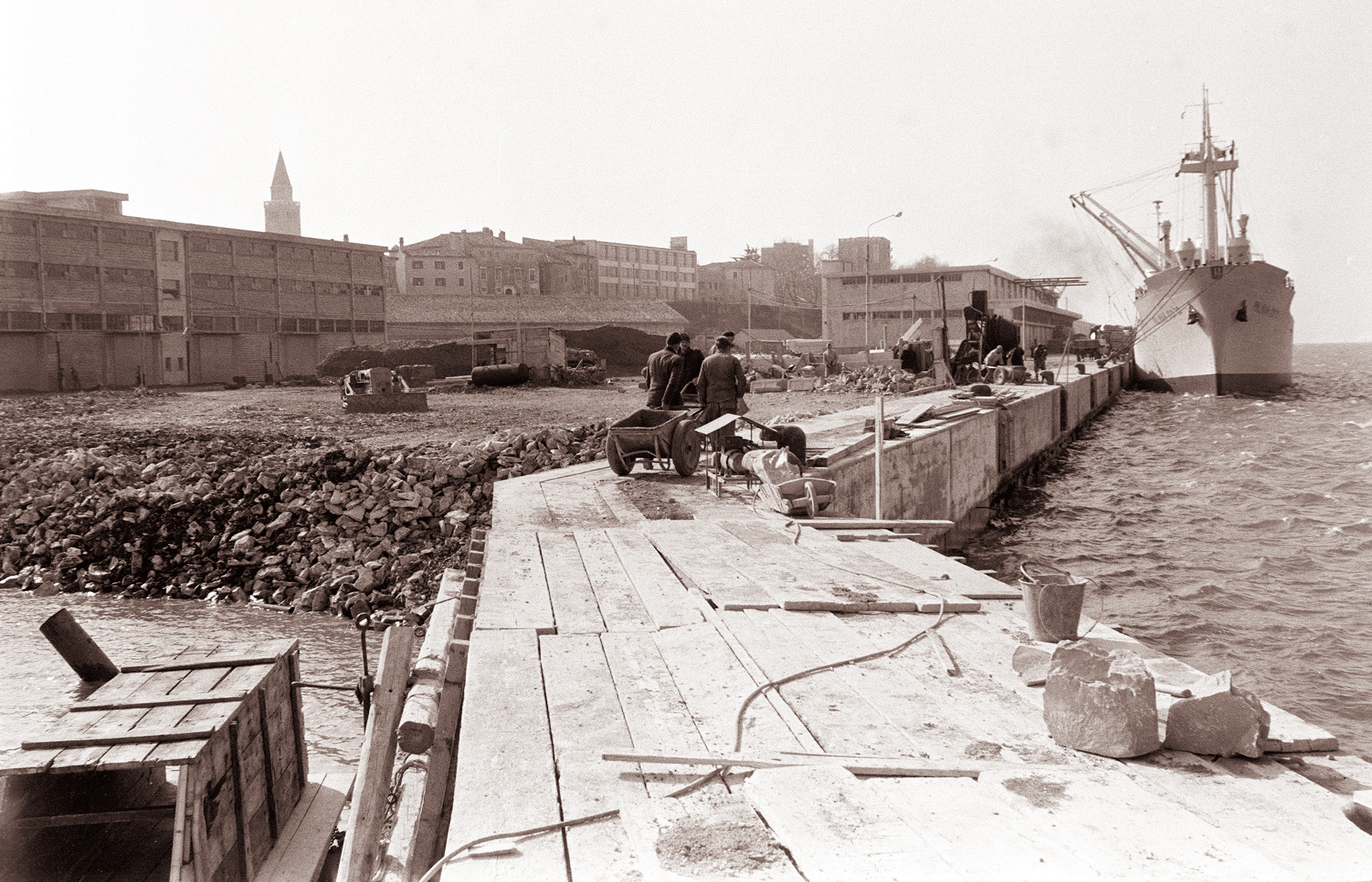 Izraelska ladja Palmah v koprskem pristanišču